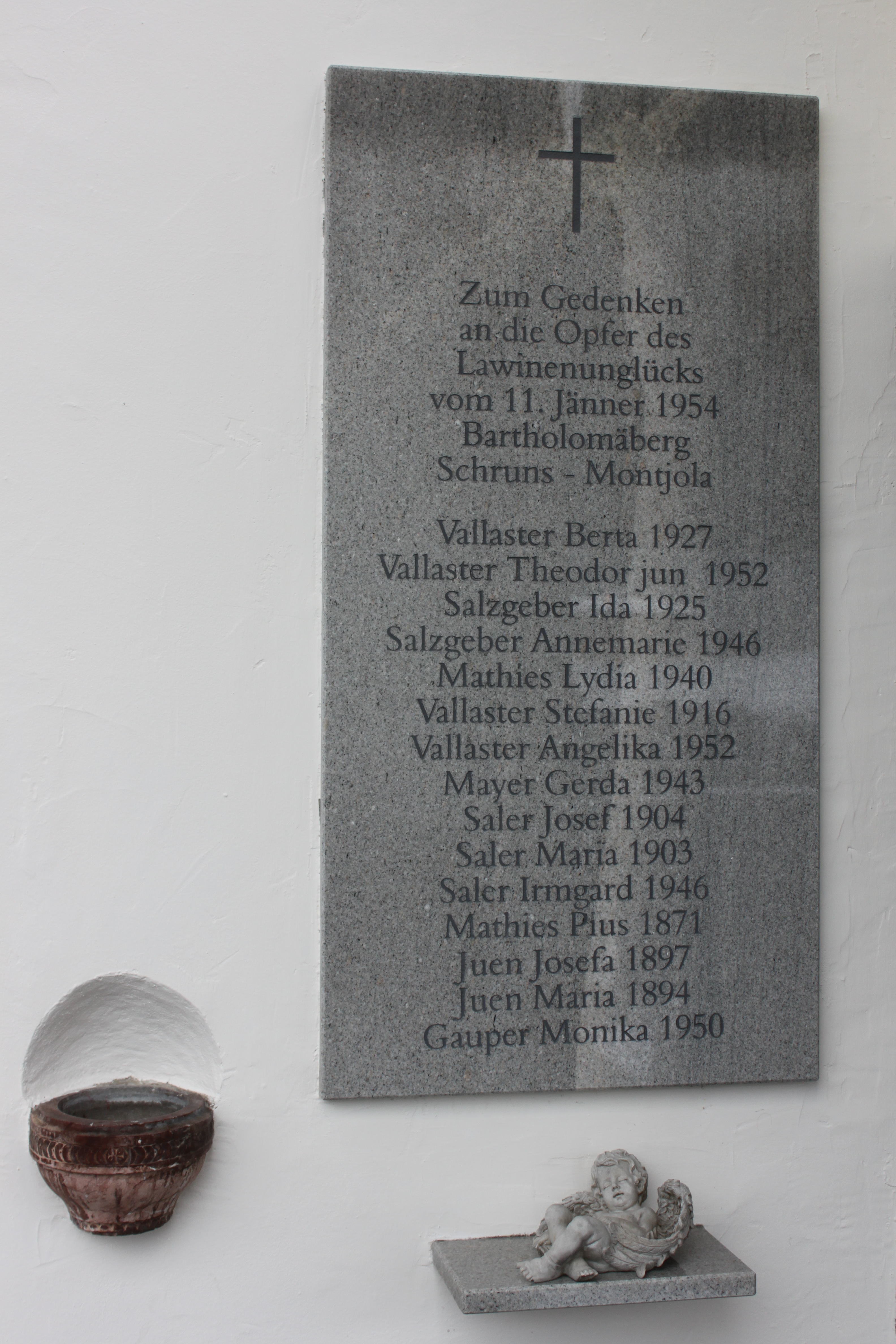 Friedhof Schruns, Gedenktafel für die Lawinenopfer von Bartholomäberg und Schruns